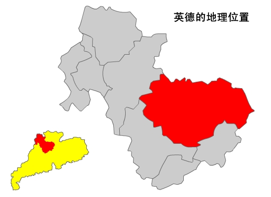 内容介绍：英德市在清远地图上的标示 原创者：zhuwq 创作日期：2005年1月 创作方法：将广东地图用扫描仪输入电脑，再将图片导入FLASH，用画笔描出轮廓，着填充，删除原图片，导出JPG图象便大工告成，这样制作的优点是，开始辛苦了点，但绘制别的市便替换颜色即可。